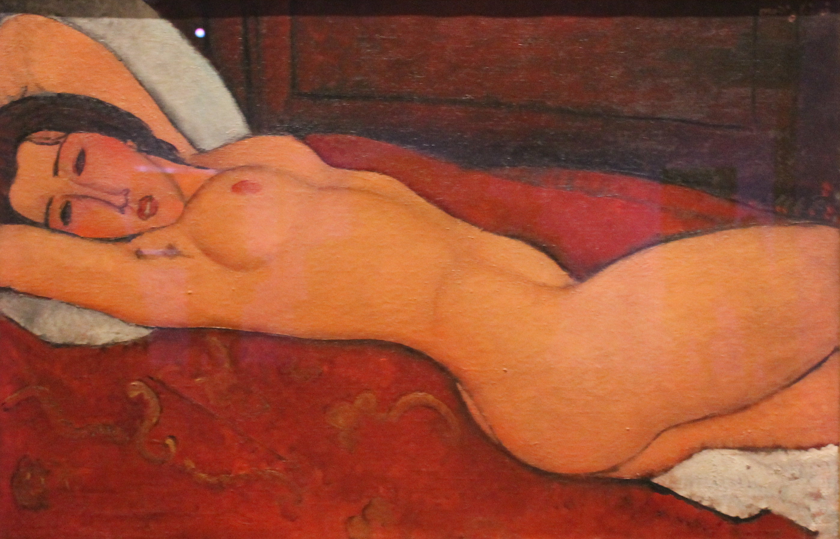 Reclining Nude (1917), de Amedeo Modigliani. Óleo sobre tela. Museo Metropolitano de Arte de Nueva York. The Mr. and Mrs. Klaus G. Perls Collection, 1997.